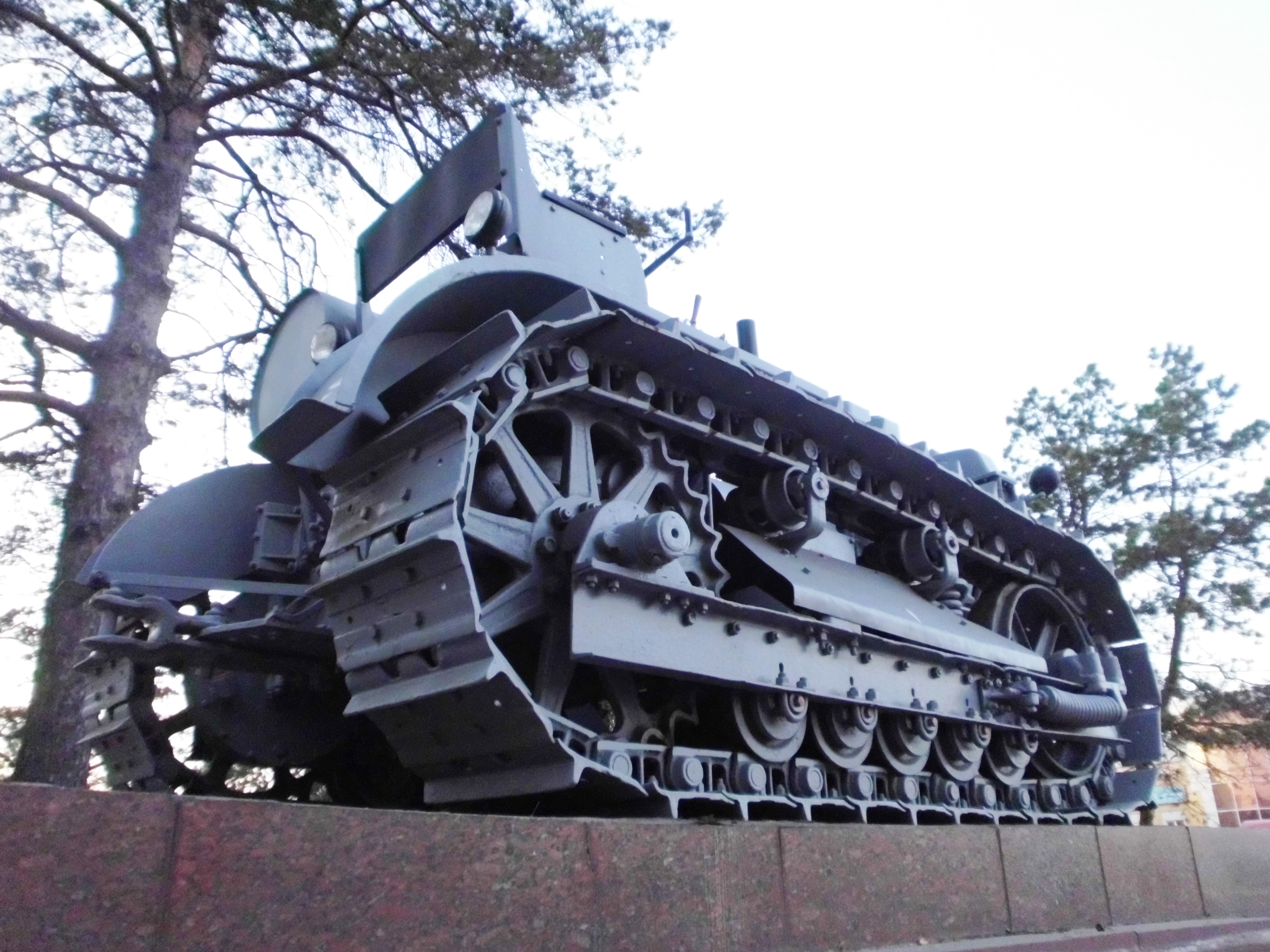 Памятник «Первенец ЧТЗ - трактор С-60»: проспект Ленина, 3 (перед зданием заводоуправления), город Челябинск, Челябинская область.